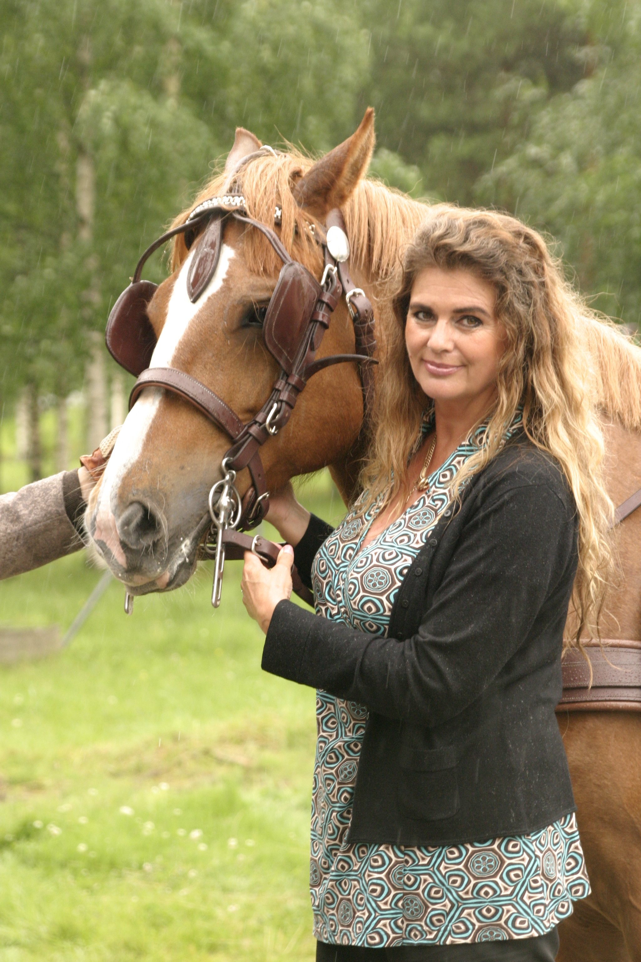 Riitta Väisänen ja suomenhevonen Vihreillä Niityillä 2007